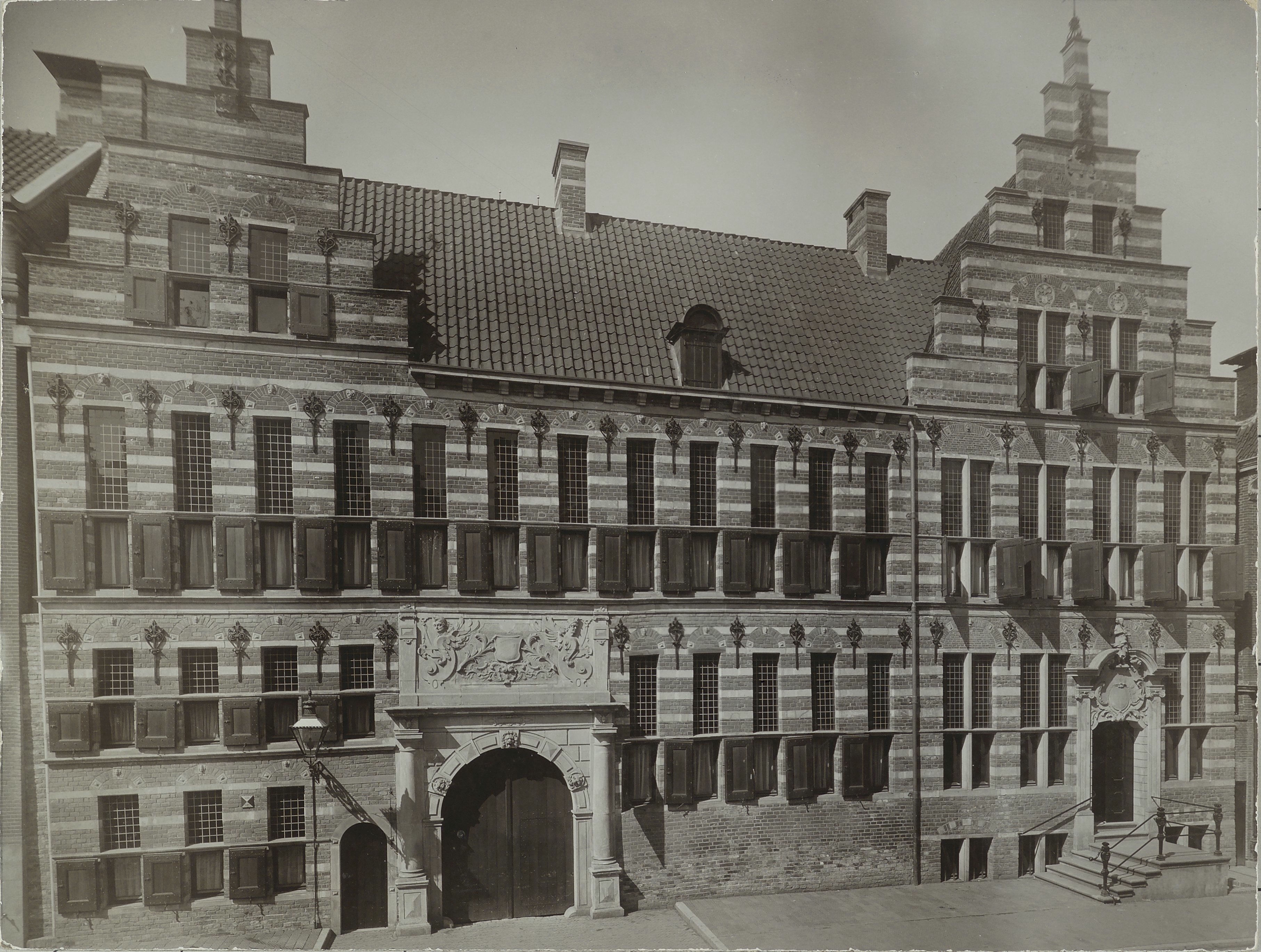 Vm. Rechtbank, Groningen, voorgevel (gerestaureerd 1913-1917)